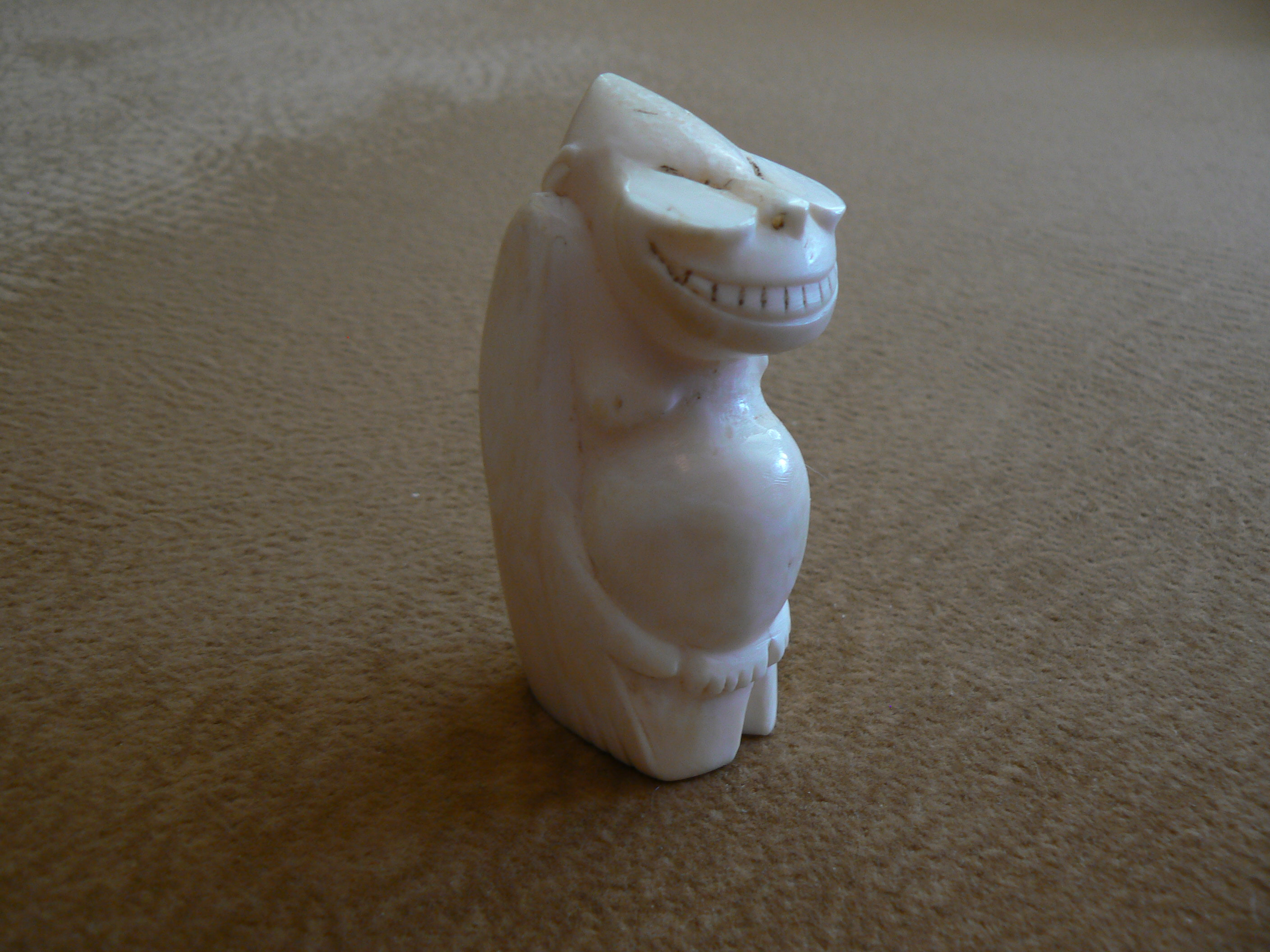 Пеликен. Чукотка. 20-е годы XX века. Частное собрание.